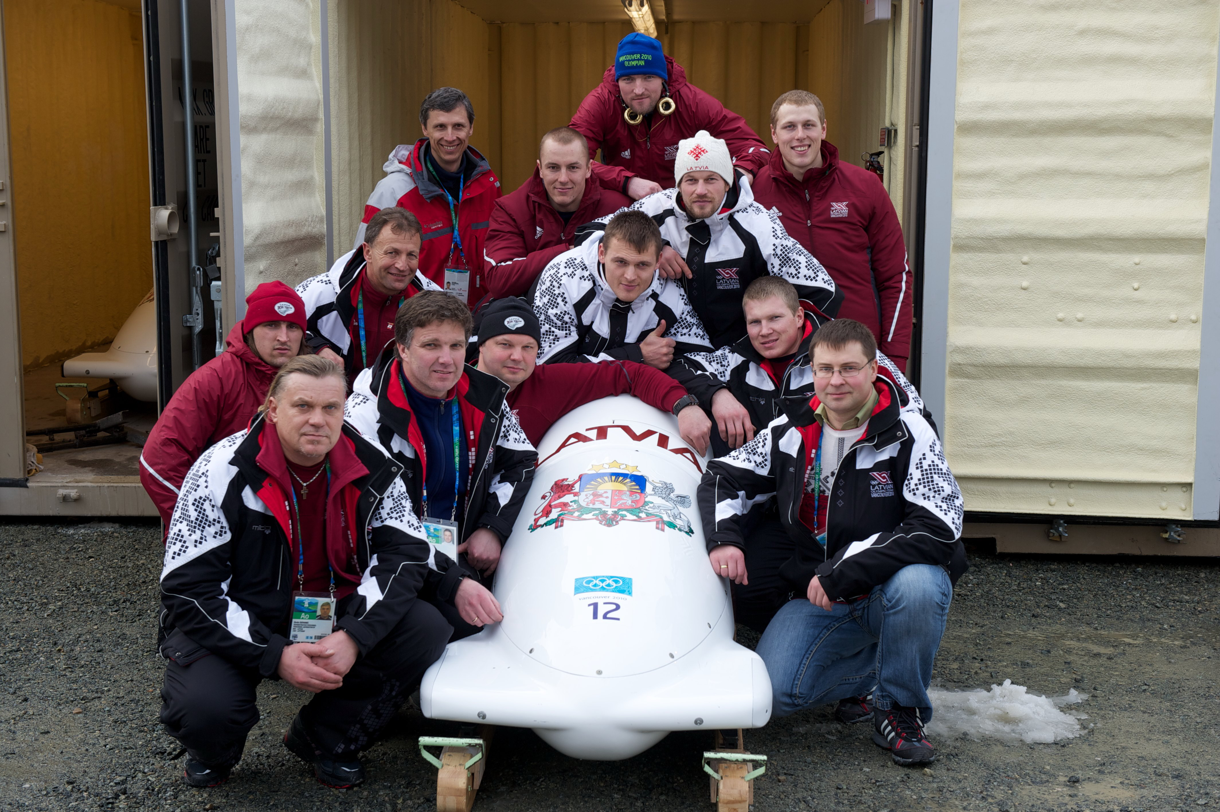 Ministru prezidents Valdis Dombrovskis (no labās pirmajā rindā) Uģis Žaļims, Daumants Dreiškens, Edijs Kalends, Sandis Prūsis, Zintis Ekmanis, Pāvels Tulubjevs (stāv otrajā rindā no labās), Intars Dambis, Jānis Miņins, Raivis Broks, Latvijas vēstnieks Kanādā Marģers Krams, Elmārs Priede un Oskars Melbārdis Foto: Ilmārs Znotiņš